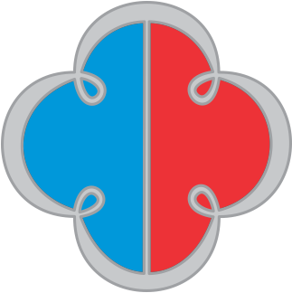 Quaderna do Curso de Formação de Sargentos do Exército Brasileiro